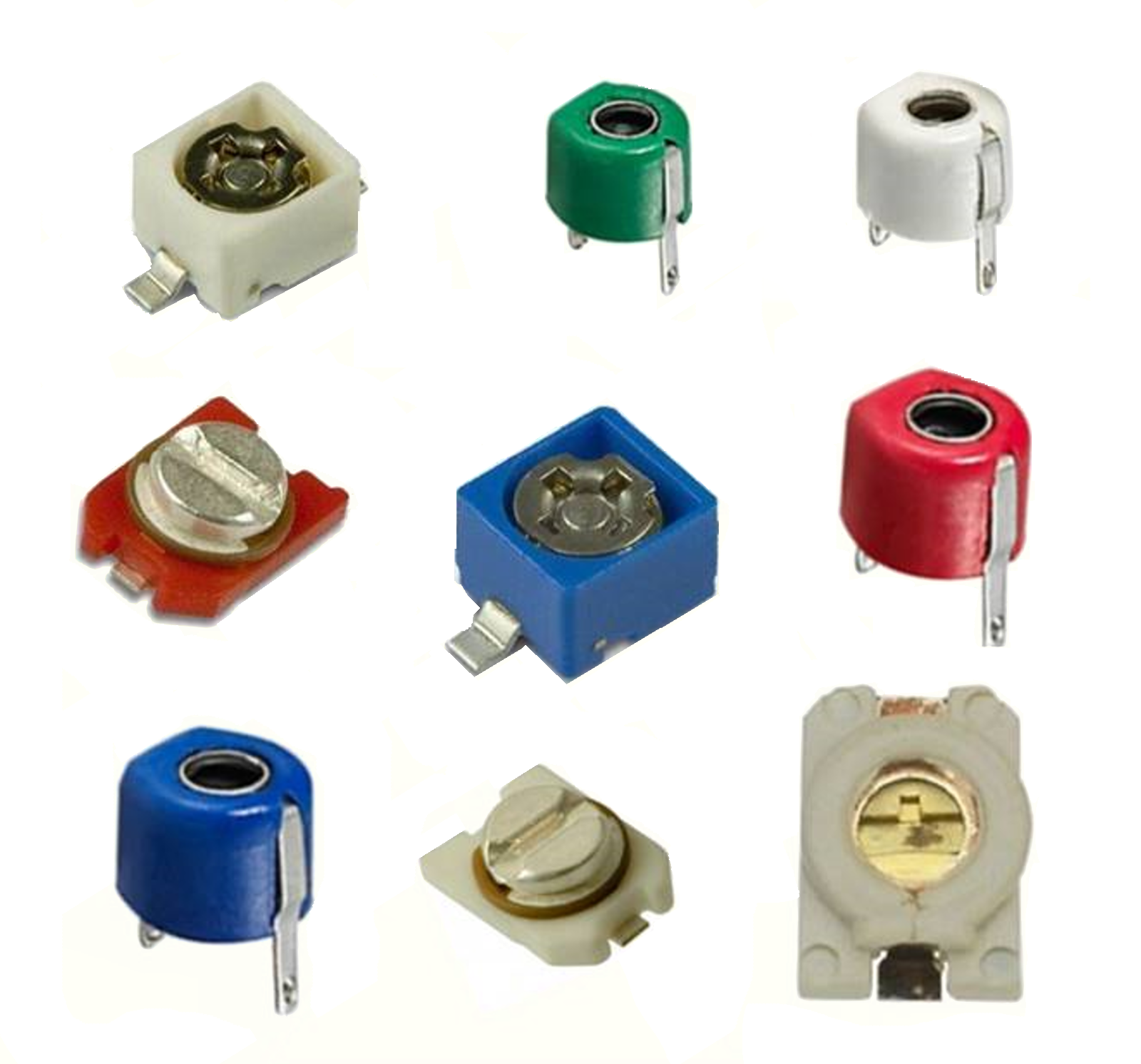 Zusammenstellung diverser SMD-Trimmer-Kondensatoren